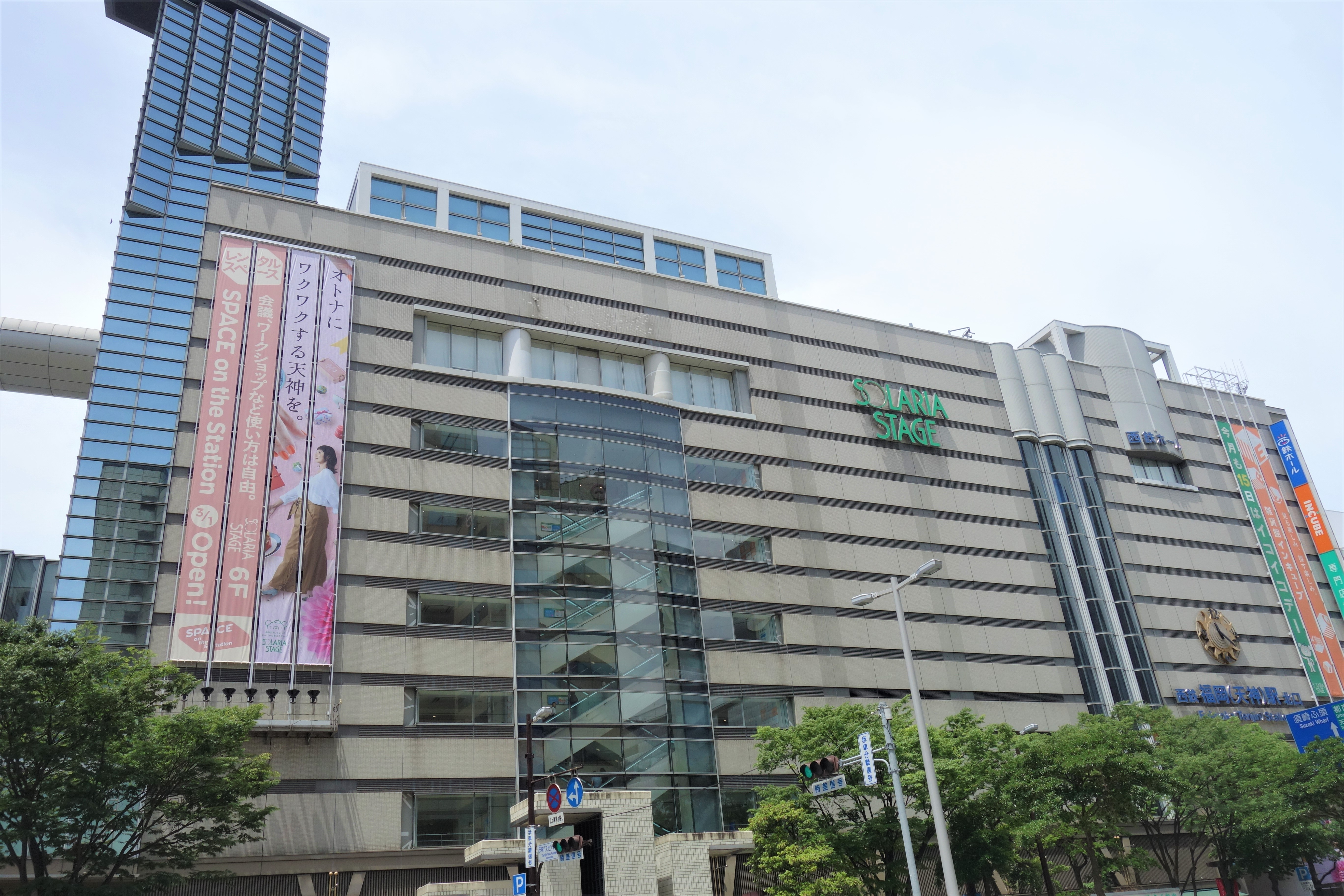 ソラリアステージビル